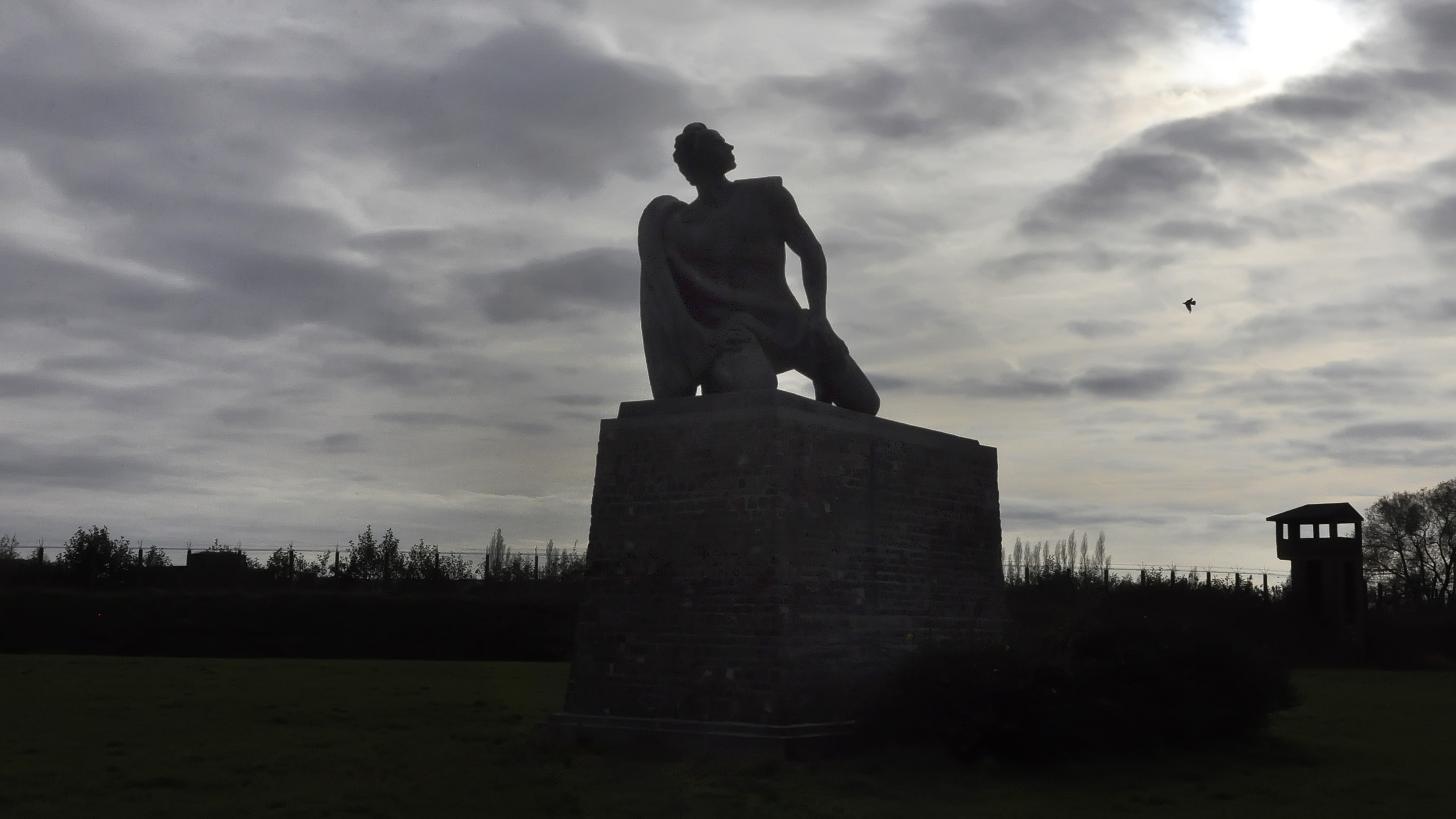 Idel Ianchelevici (1909-1994) 'De weerstander' Fort van Breendonk 8-11-2015 This photo of immovable heritage has been taken in the Flemish Region